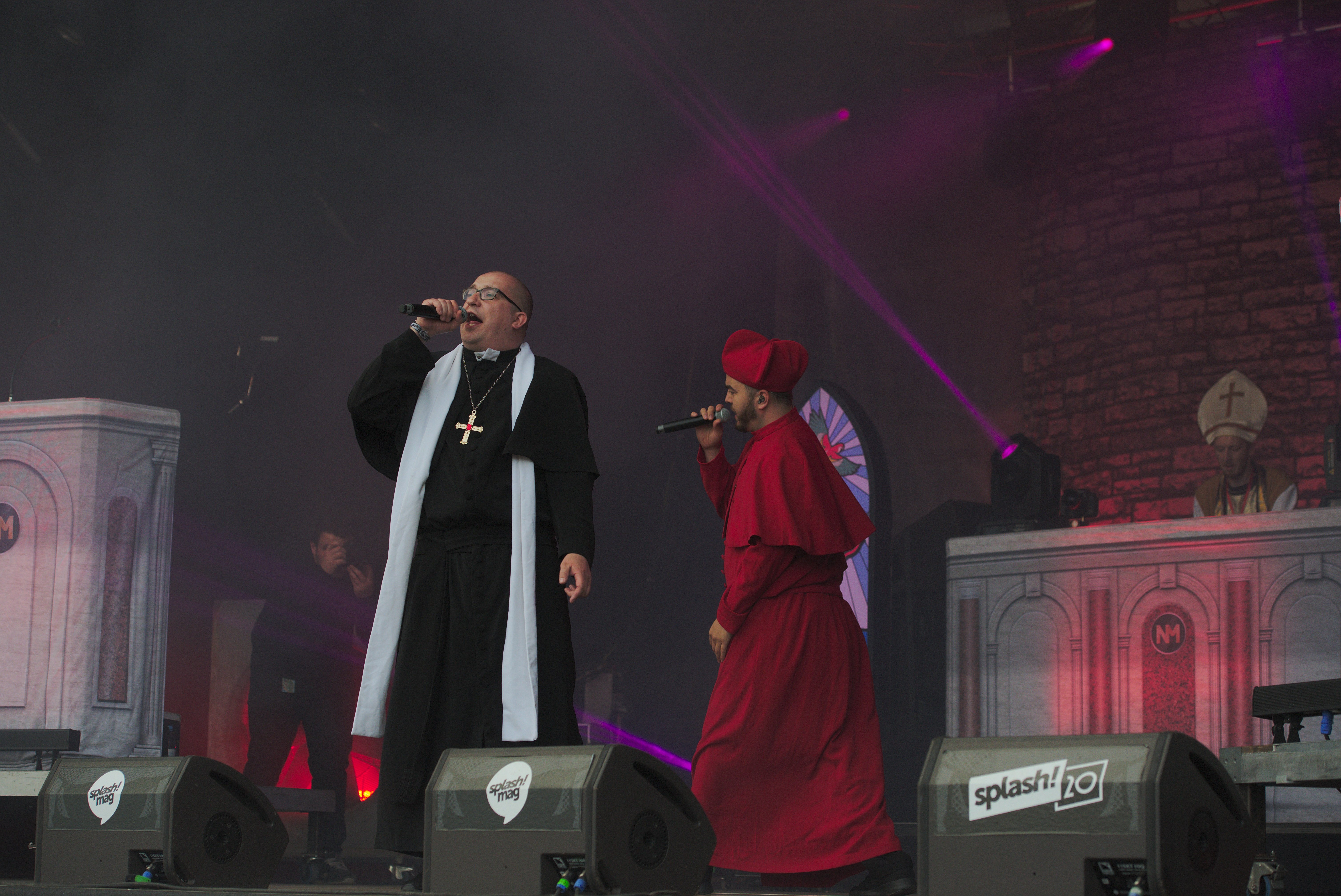 Die deutschen Rapper Audio88 (links) und Yassin (rechts) beim splash! Festival 20 (2017).